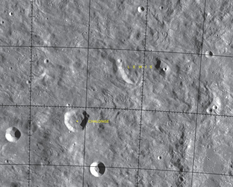 Cráter lunar Lewis. Localización. (Imagen LRO)